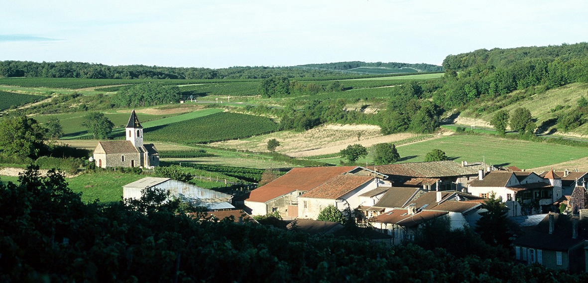 Vue partielle du hameau de Fissy. Isolée sur sa butte : la chapelle Notre-Dame-de-Pitié.